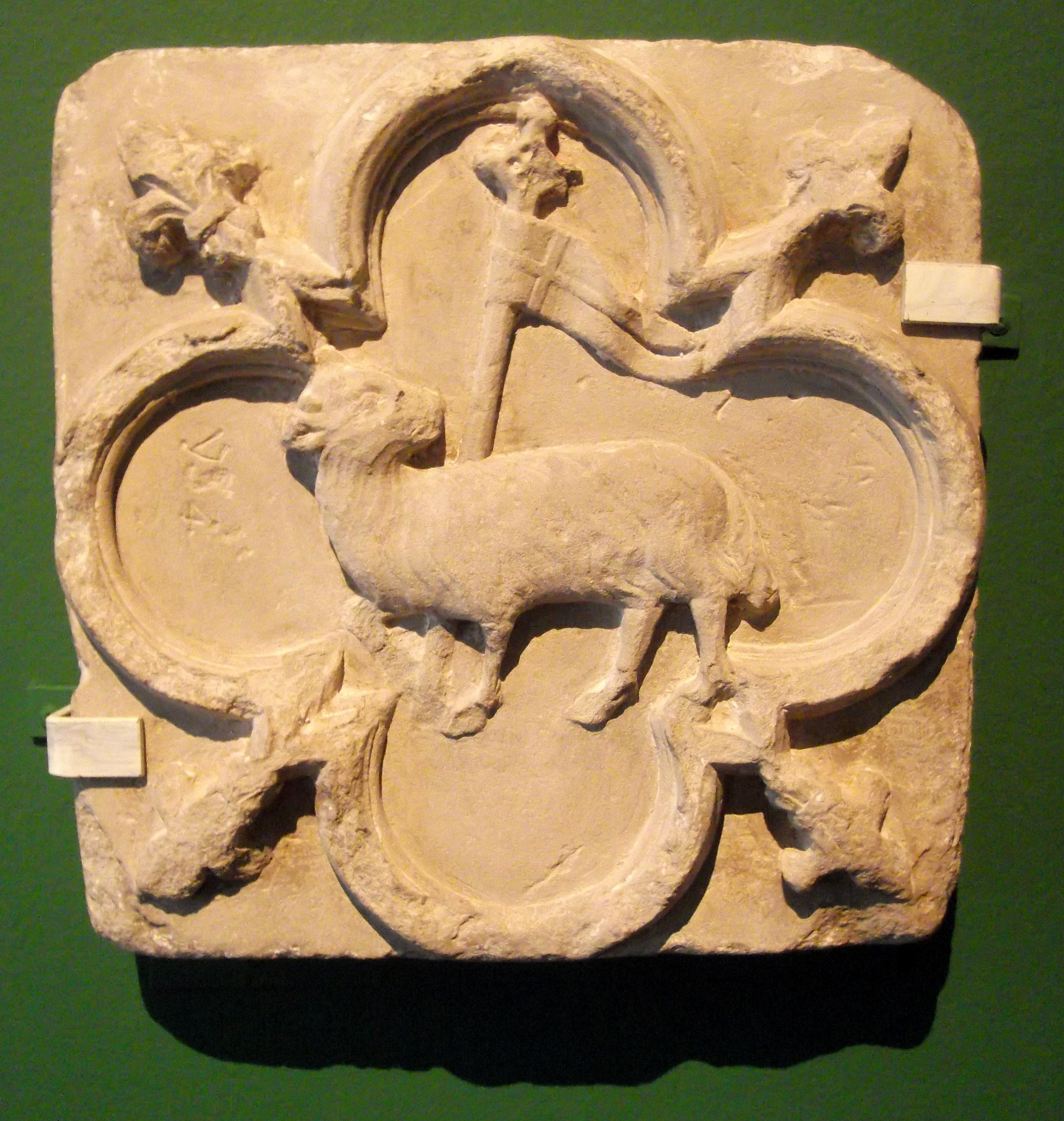 Emblème de la ville basse de Carcassonne à l'effigie de l'agneau pascal en pierre calcaire du XIVe siècle.